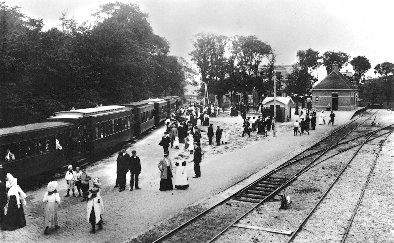 Tramstation te Bergen (N.H) aan de tramlijn Alkmaar-Bergen aan Zee, met links een stoomtram naar Alkmaar; circa 1909. Collectie van het Utrechts Archief.